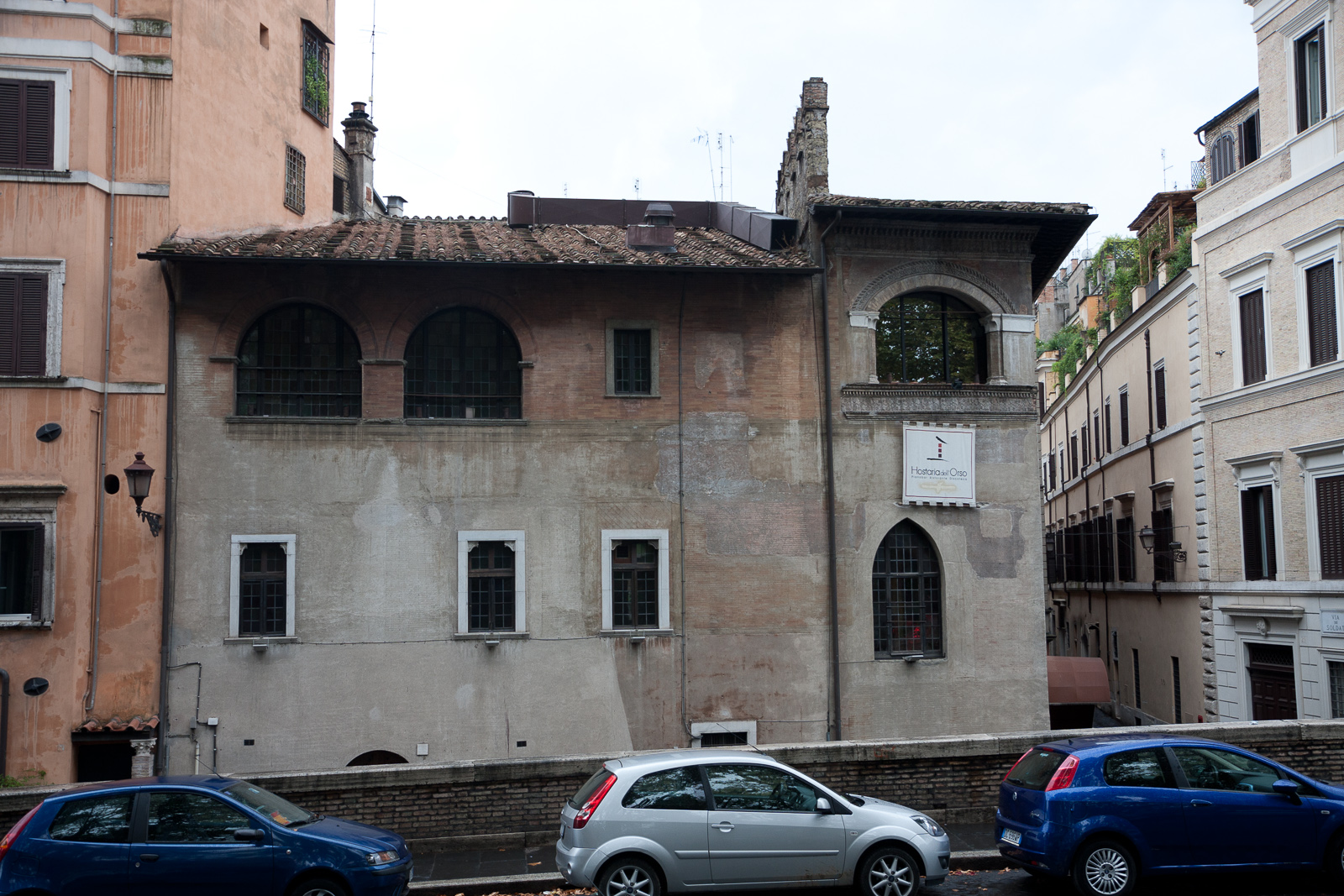 Rione V Ponte, 00186 Roma, Italy